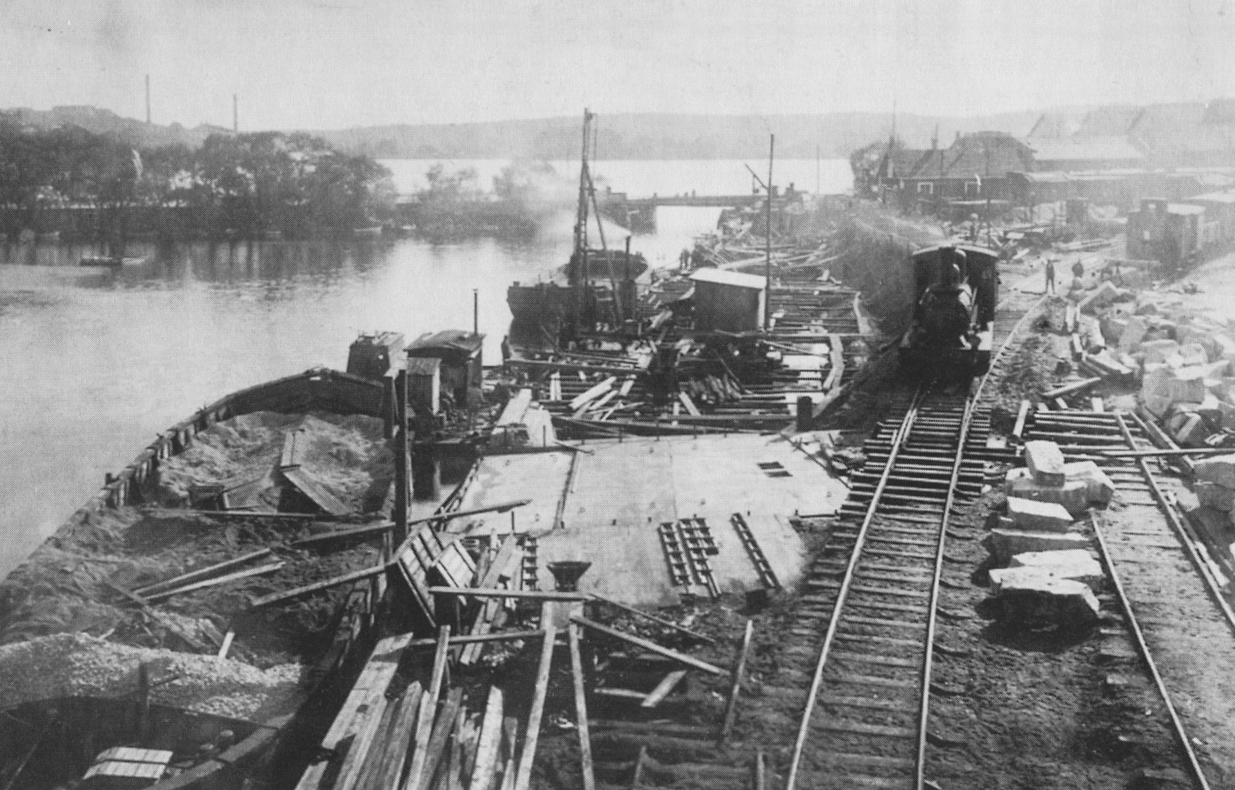 Liljeholmskajen